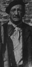 Benito Cibrián-actor